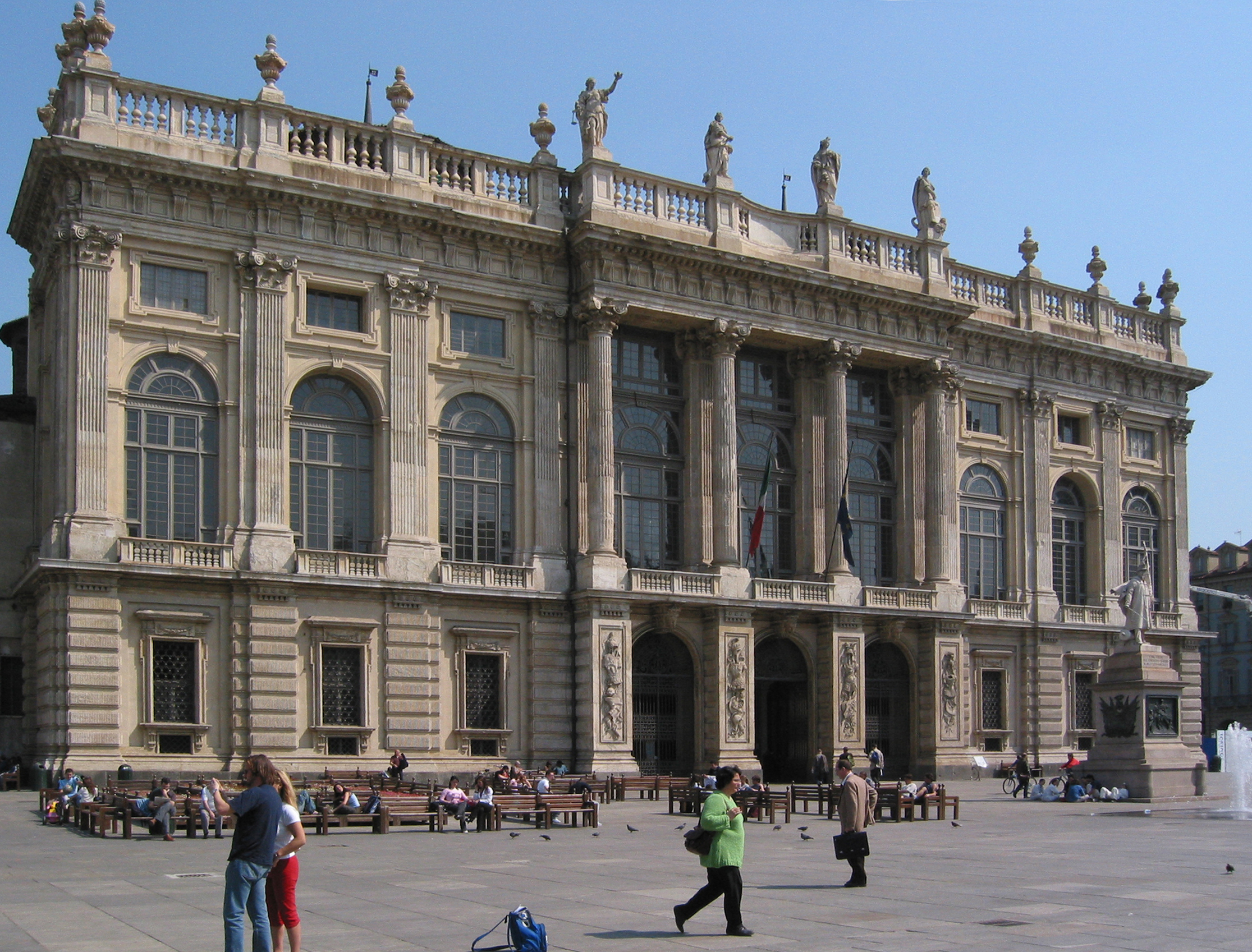 Torino, Palazzo Madama di Filippo Juvarra